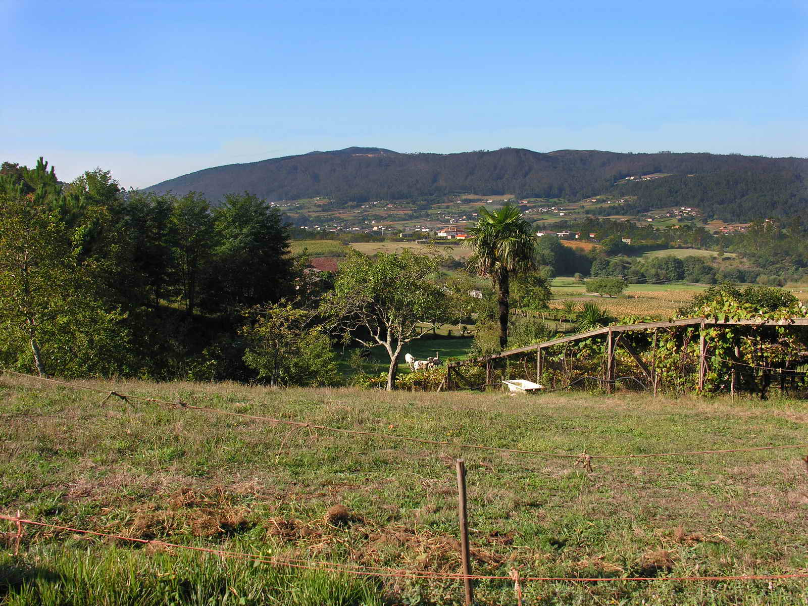 Subida a Baloira - A Estrada - Galicia - Spain